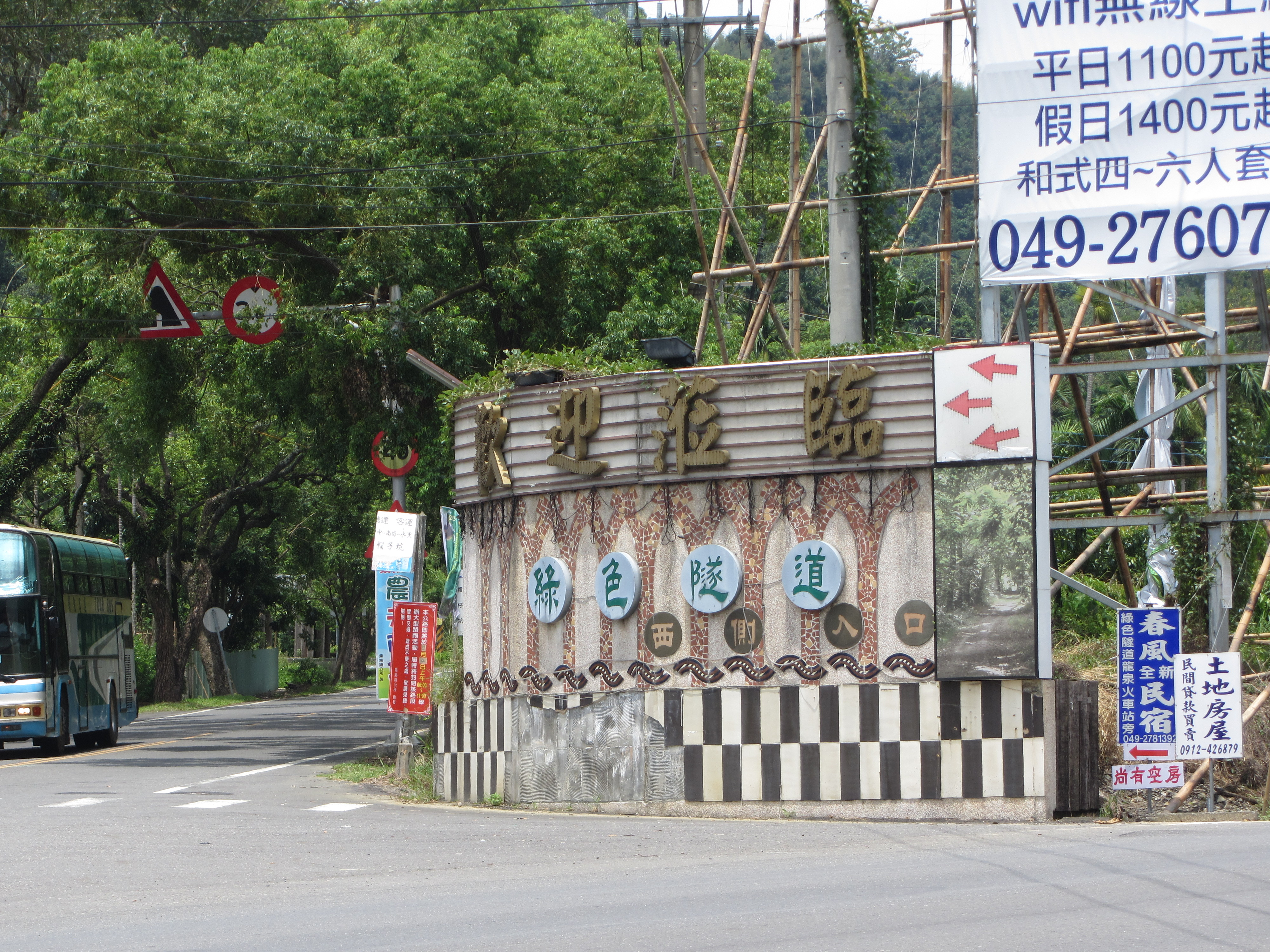 集集綠色隧道西端入口